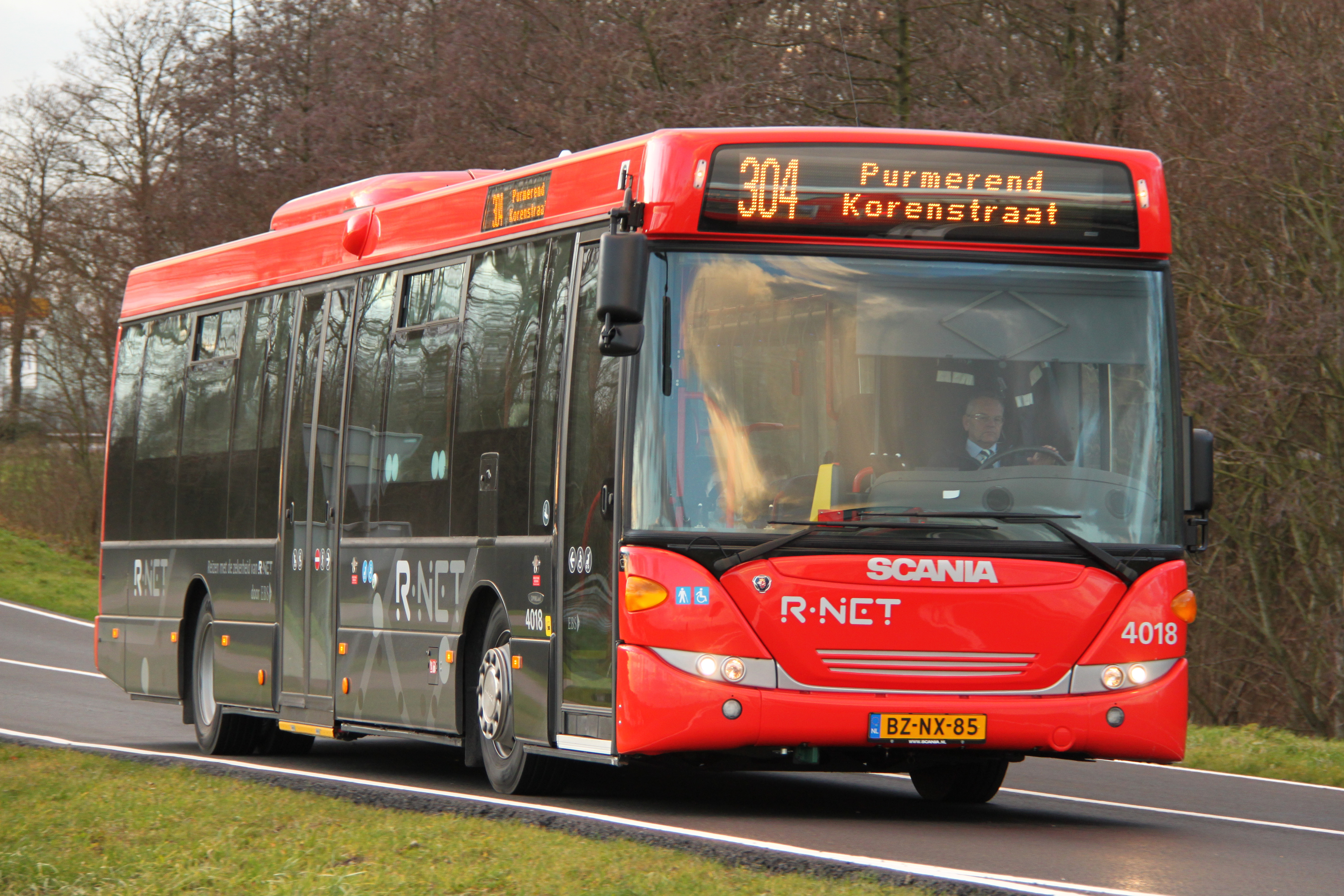 Een bus van EBS in de kleuren van R-net nabij het Schouw.